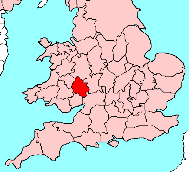 Herefordshire